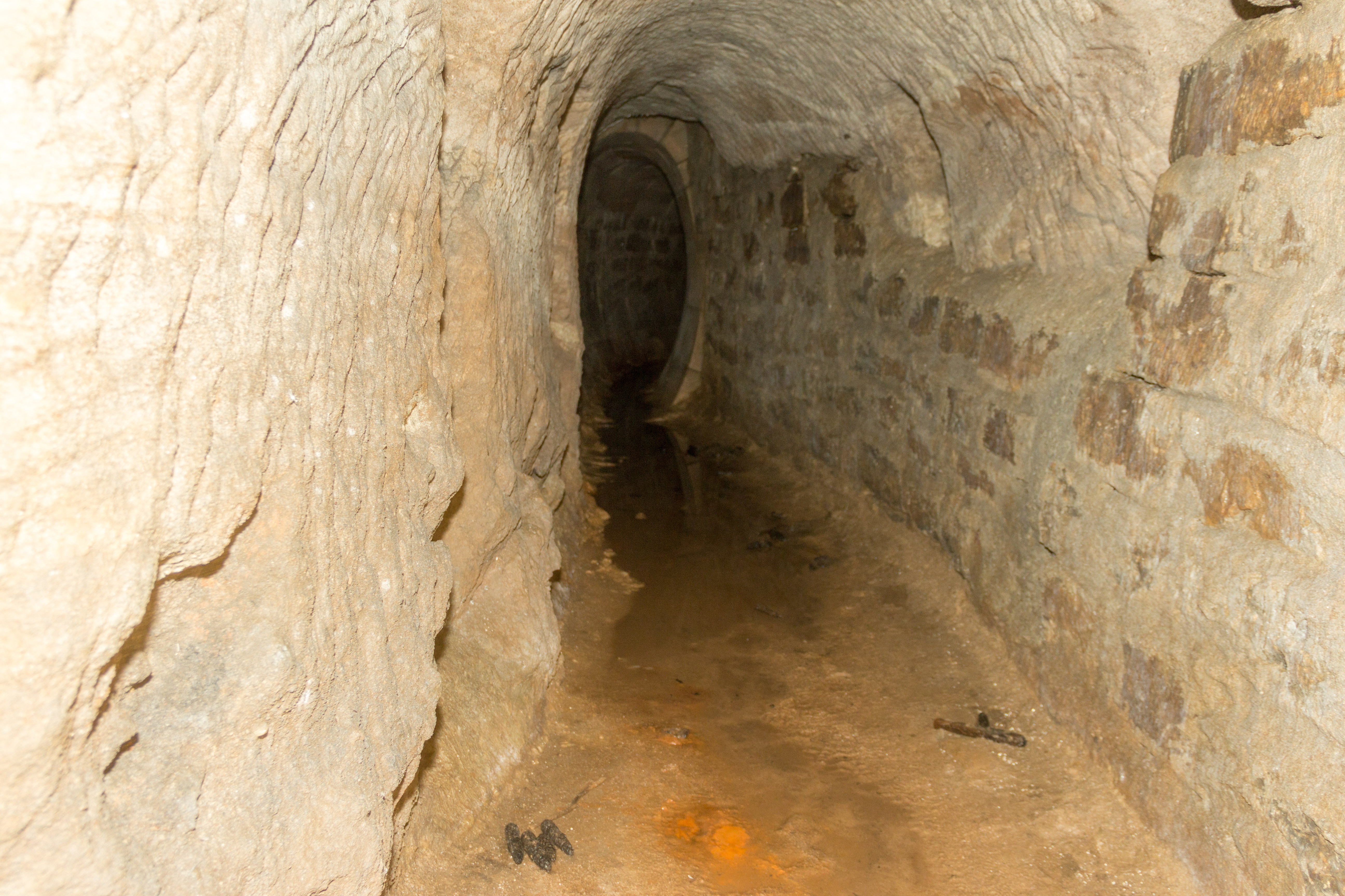 Ludwig-Donau-Main-Kanal, Distellochdamm, Schwarzenbach, Entwässerungsstollen